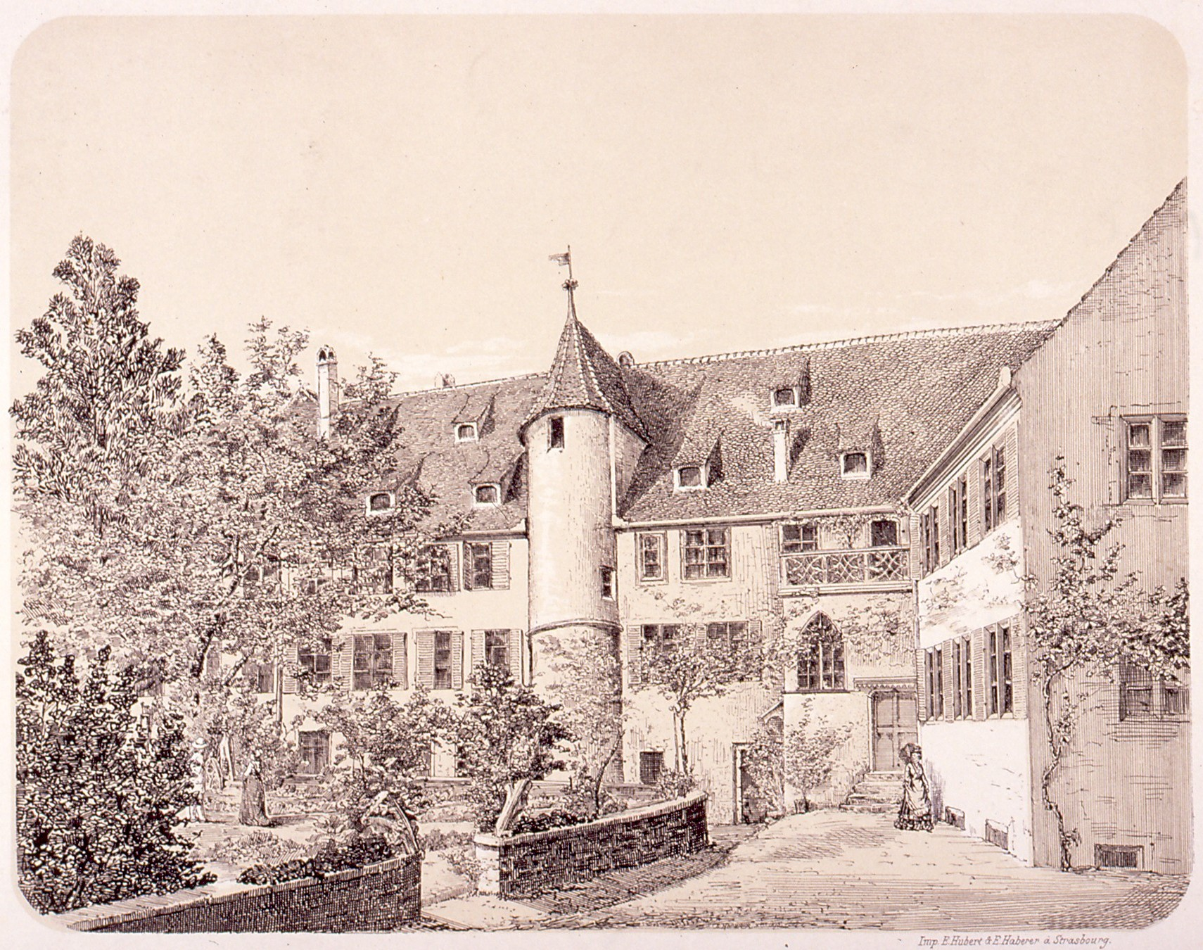 Maison de Jean Sturm, au n°1 de la Schuhmachergasse. Lithographie du XIXe siècle - coll. BNUS